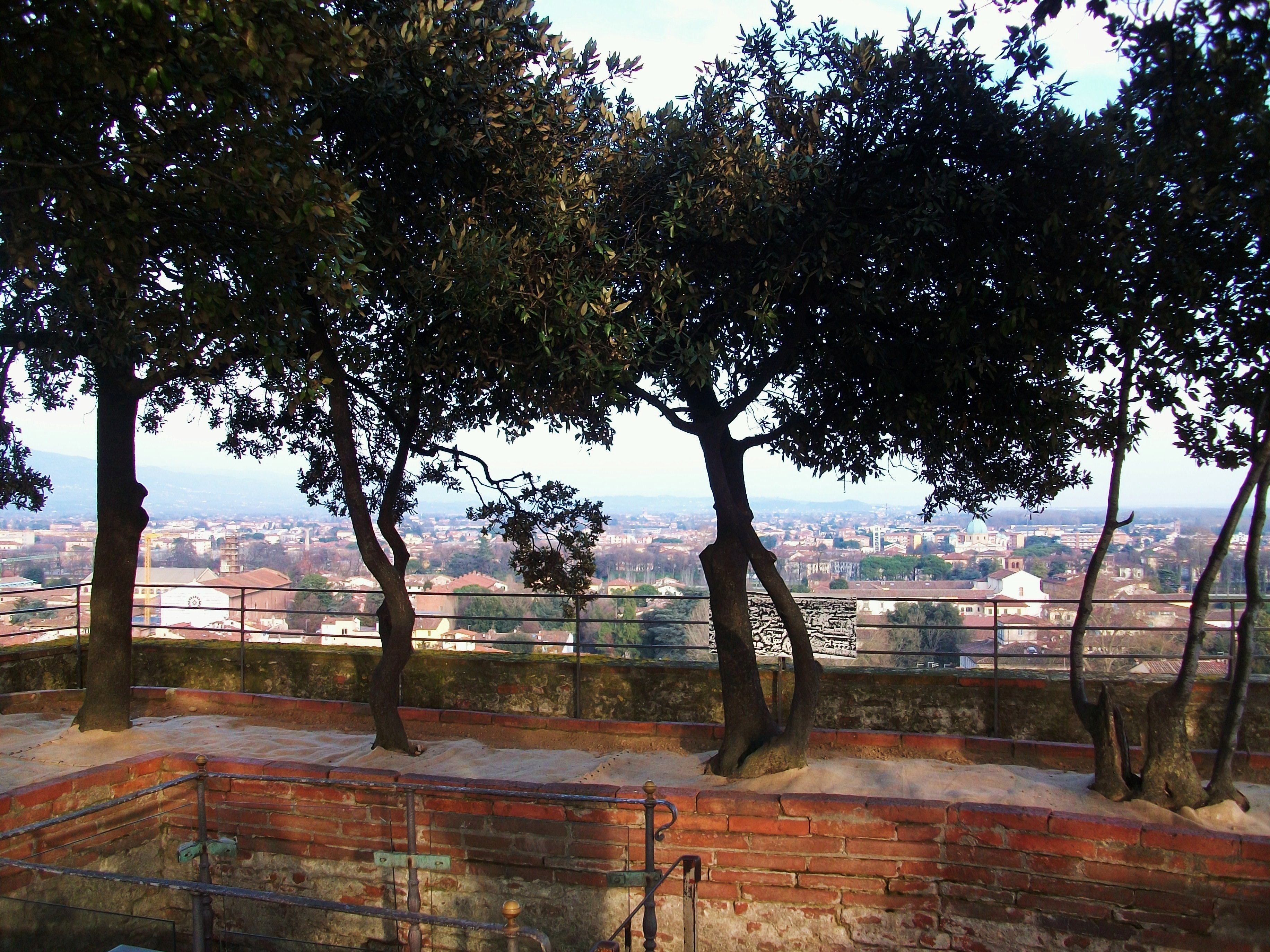 Arbres al capdamunt de la torre Guinigi de Lucca.